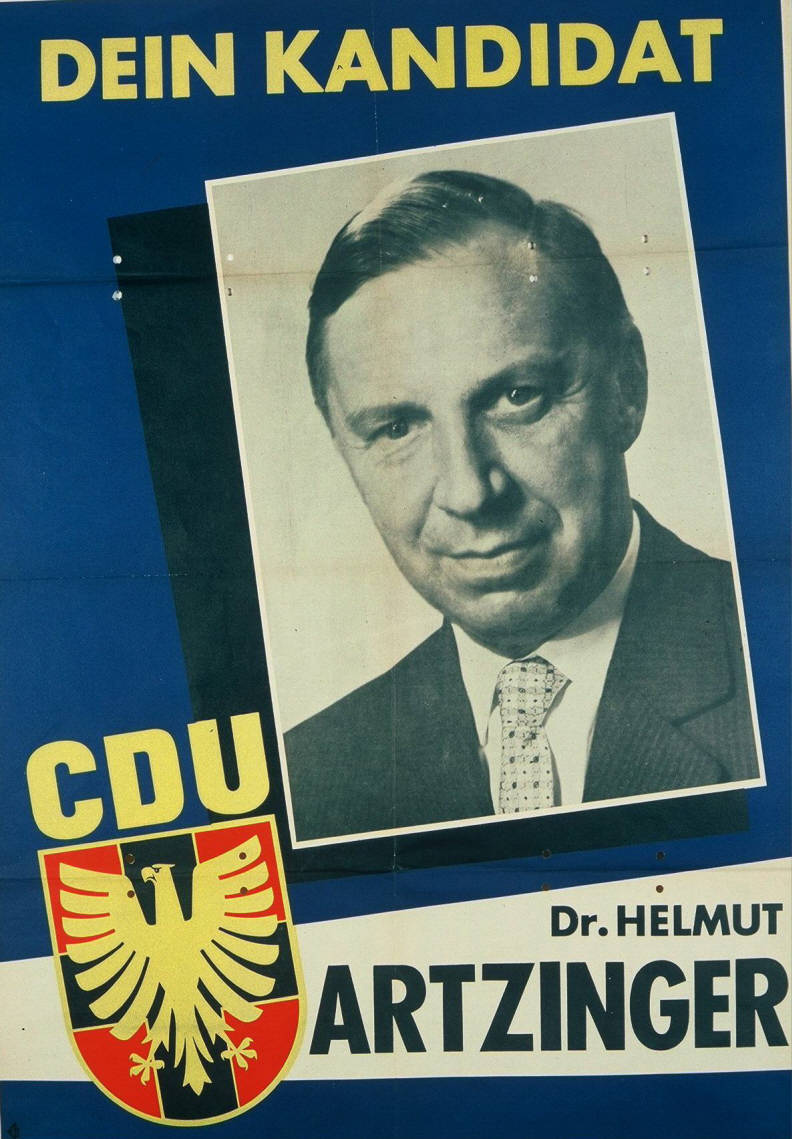 Dein Kandidat Dr. Helmut Artzinger Abbildung: Porträtfoto Plakatart: Kandidaten-/Personenplakat mit Porträt Auftraggeber: CDU-Bundesgeschäftsstelle Bonn Drucker_Druckart_Druckort: KVD Köln Objekt-Signatur: 10-001: 1025 Bestand: Plakate zu Bundestagswahlen (10-001) GliederungBestand10-18: Plakate zu Bundestagswahlen (10-001) » Die 4. Bundestagswahl am 17. September 1961 » CDU » Mit Porträtfoto Lizenz: KAS/ACDP 10-001: 1025 CC-BY-SA 3.0 DE